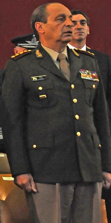 Teniente General Luis Pozzi